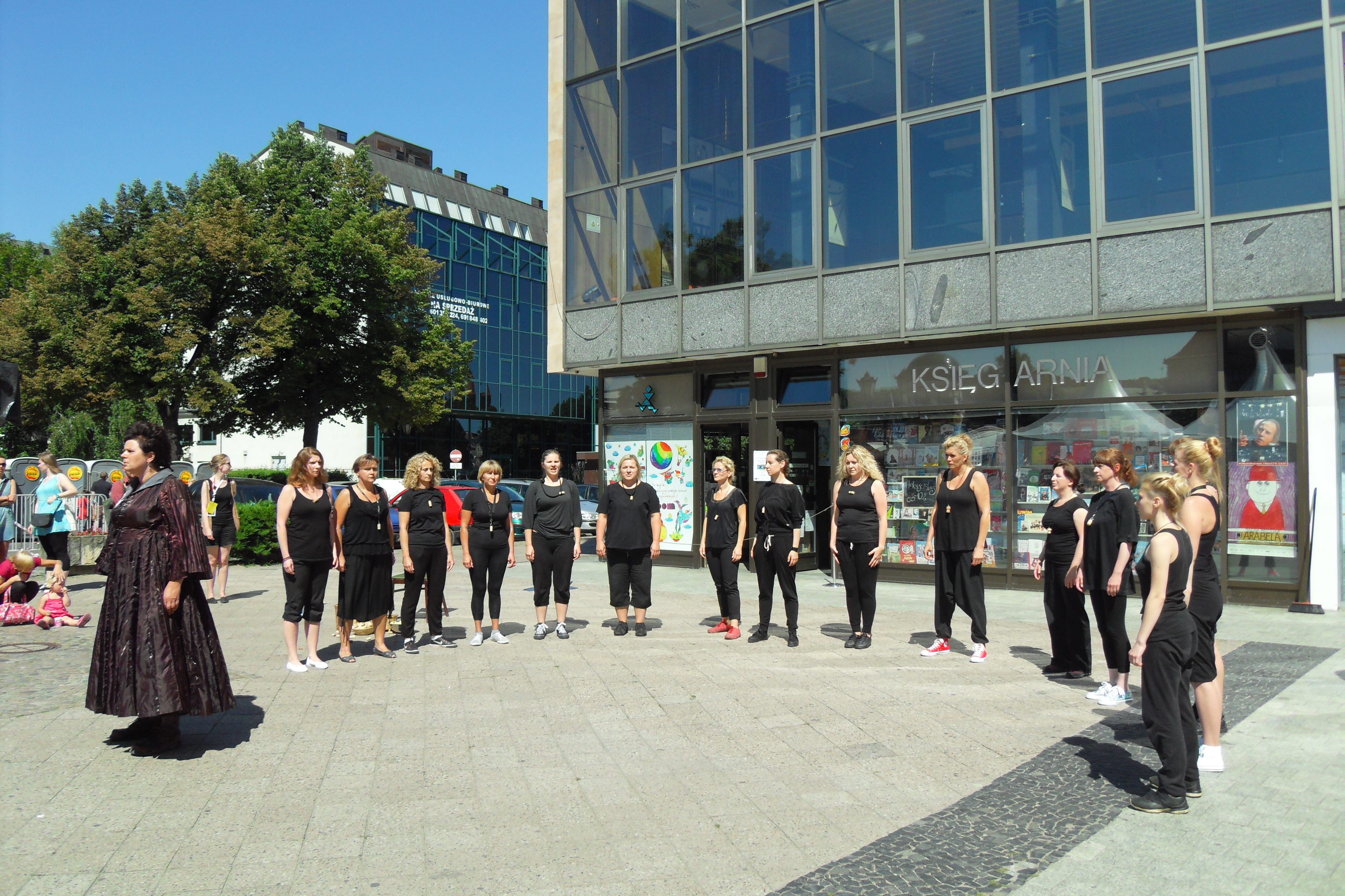 Targ Węglowy w Gdańsku. 17. Festiwal Szekspirowski w 2013 r., spektakl w wykonaniu CHÓRRAA z Gdyni.